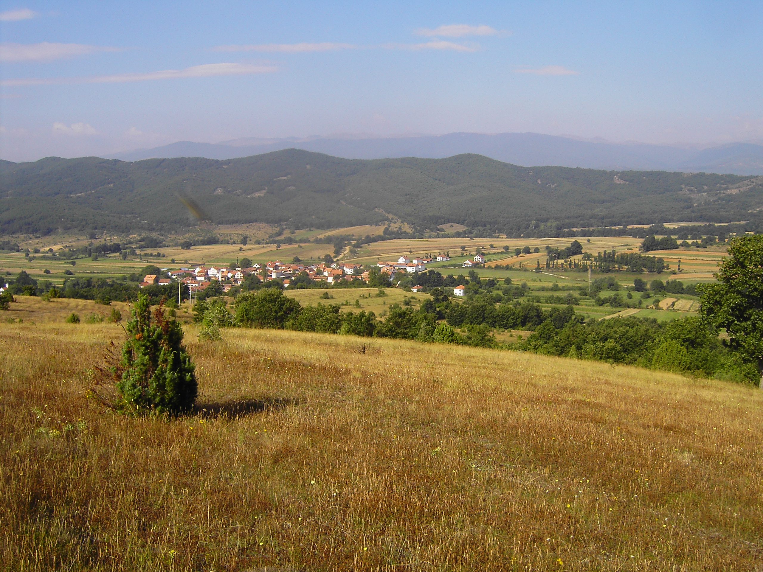 Поглед на Поповјани, кичевско